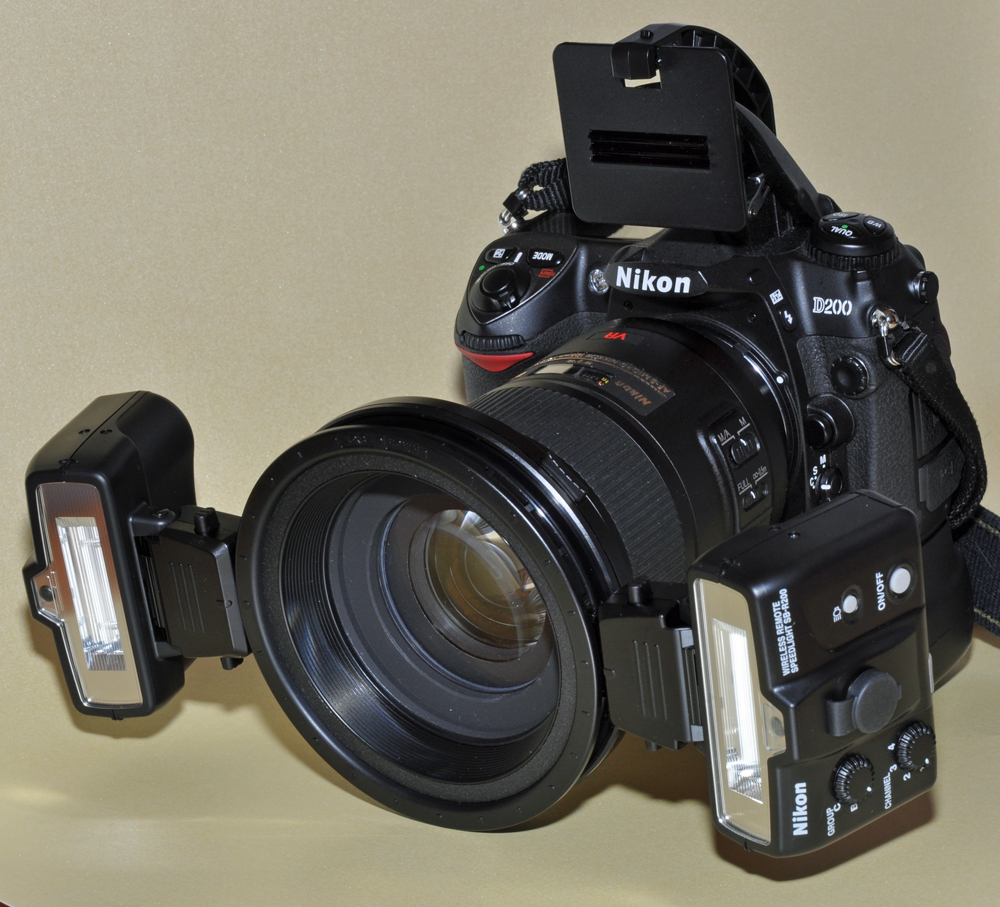 Nikon Remote Kit R1(Nikon Speedlight SB-R200)